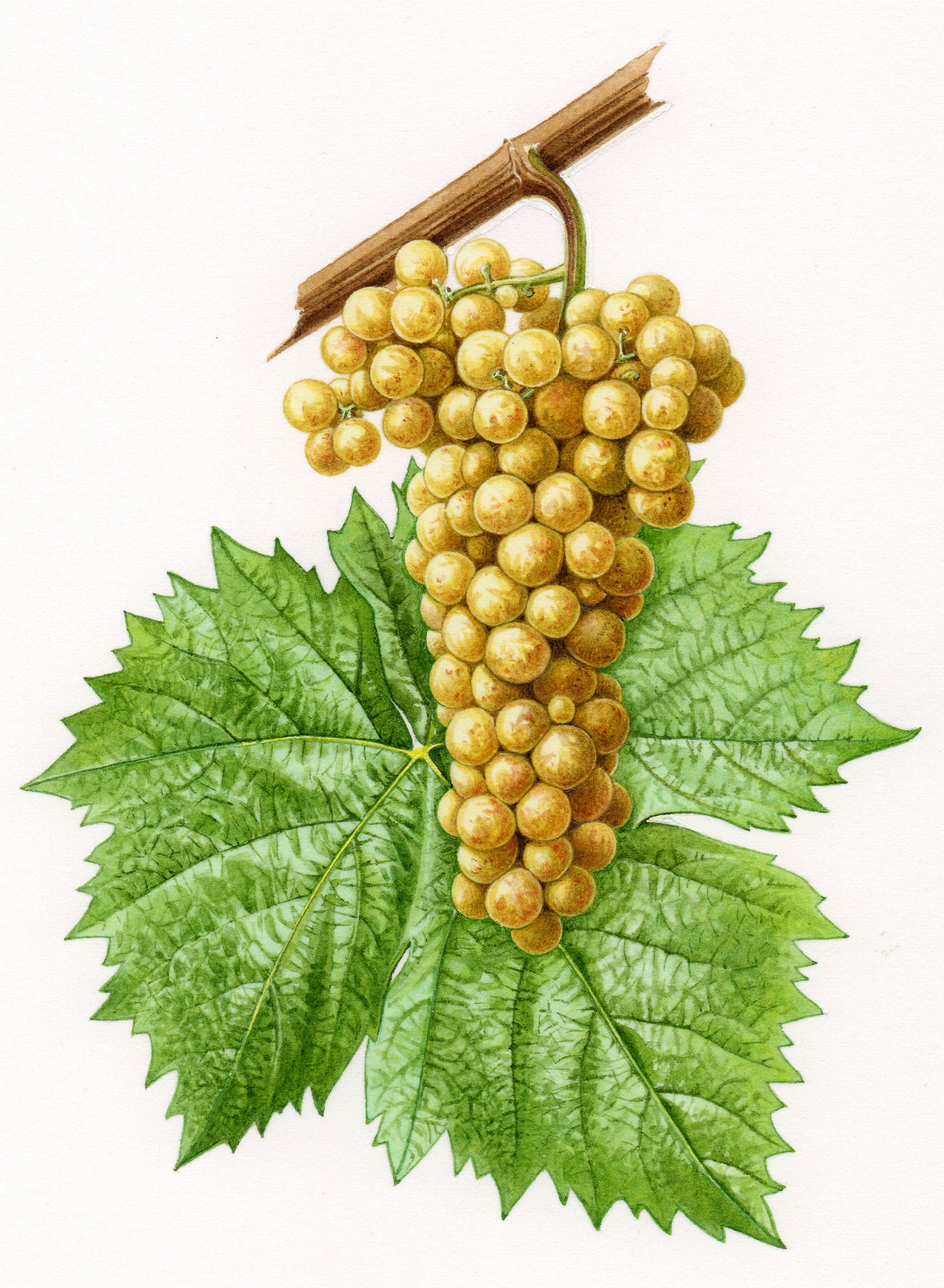 Aquarelle originale pour les Cépages de France (2001)